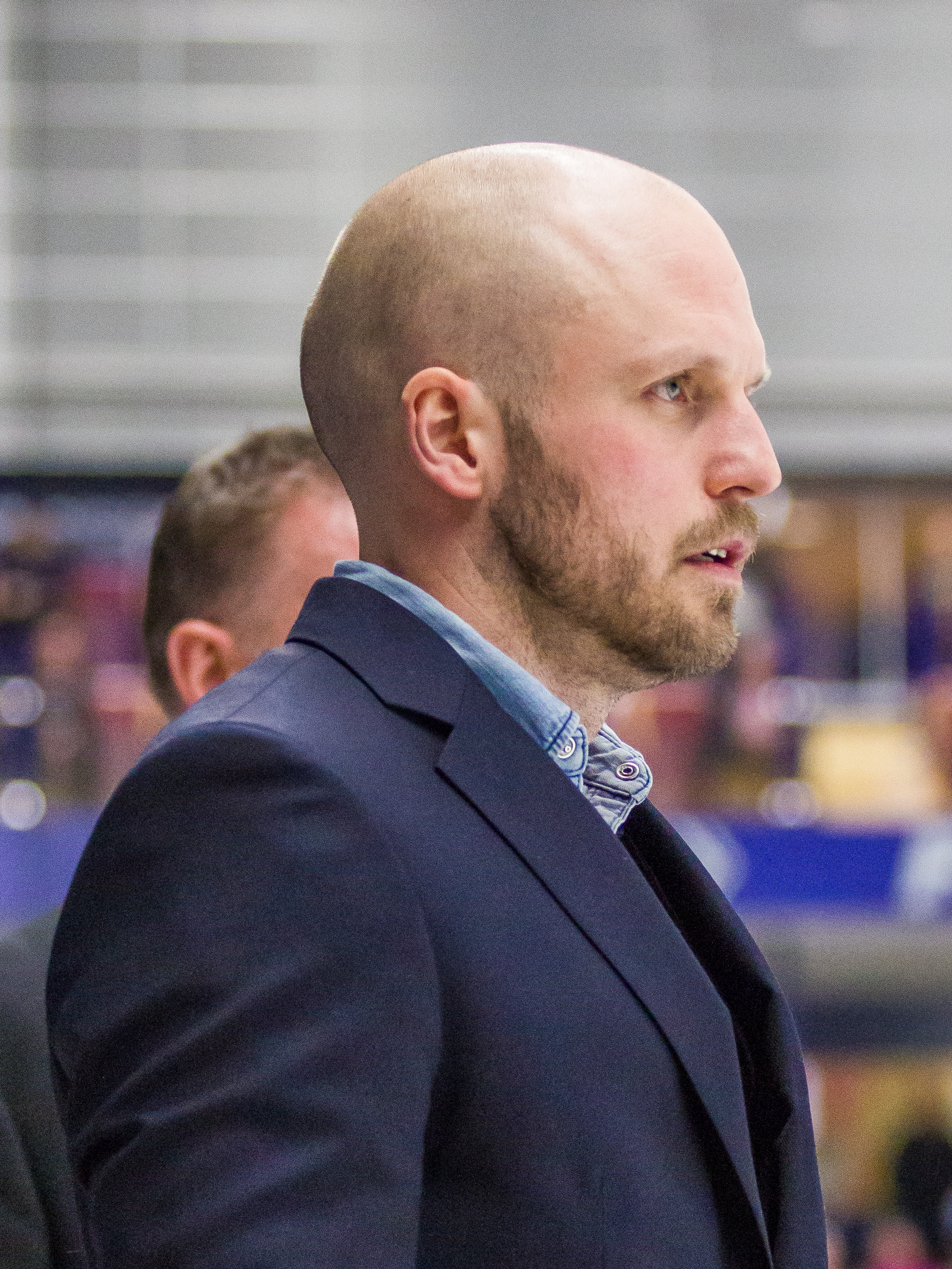 Andreas Hadelöv i Malmö Redhawks.